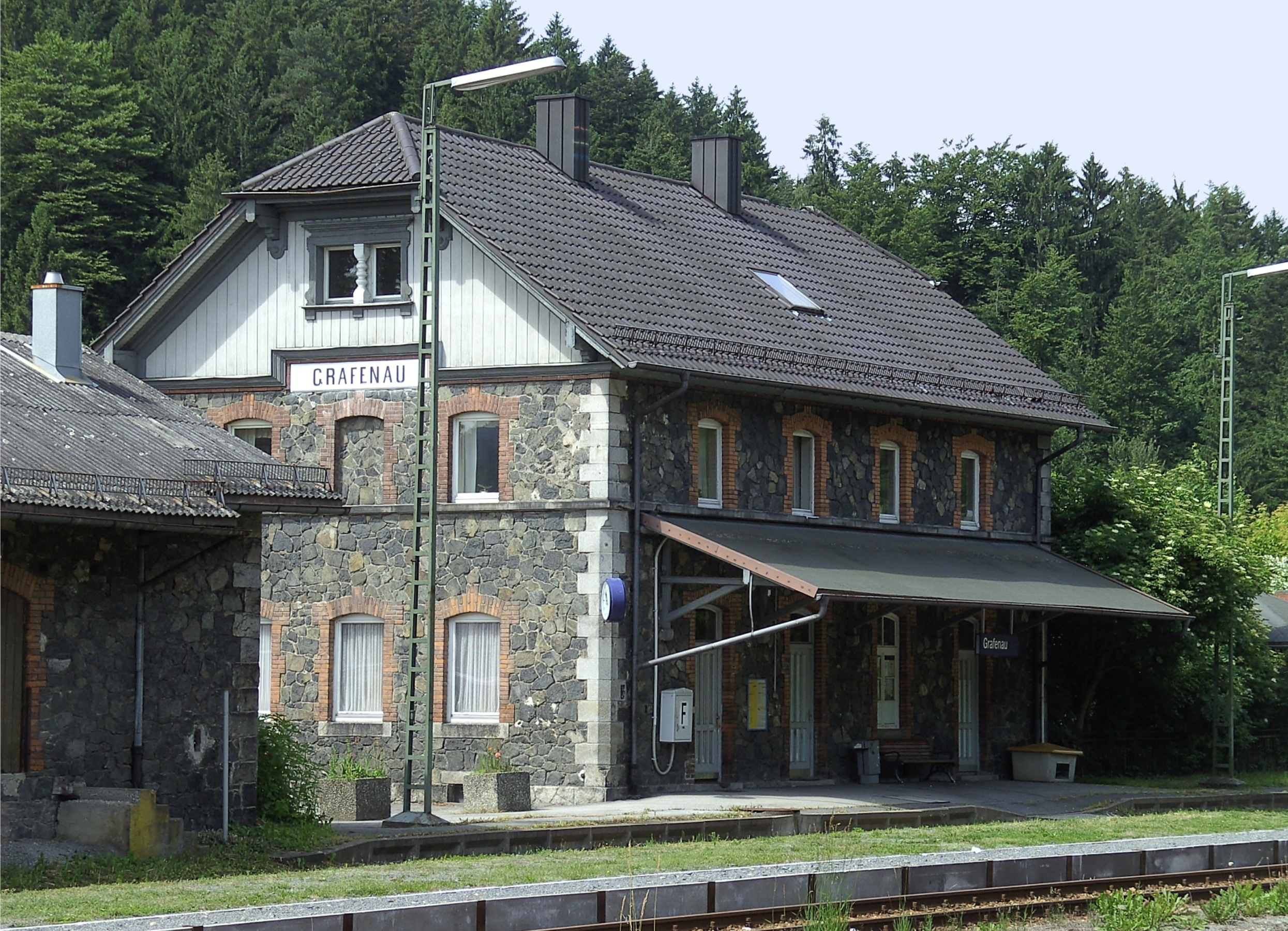 Der Bahnhof von Grafenau im Juni 2008.